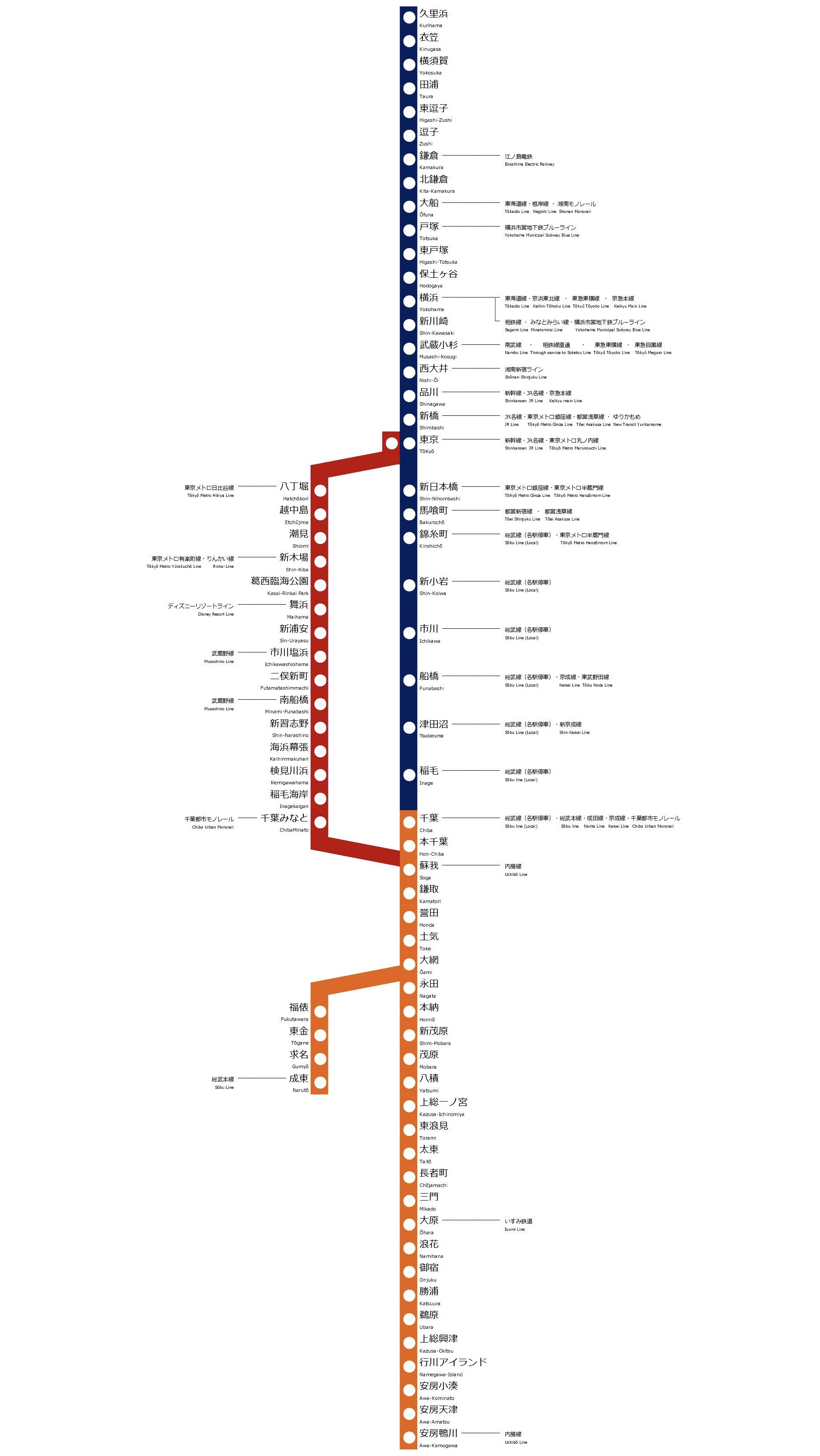 外房線の路線図